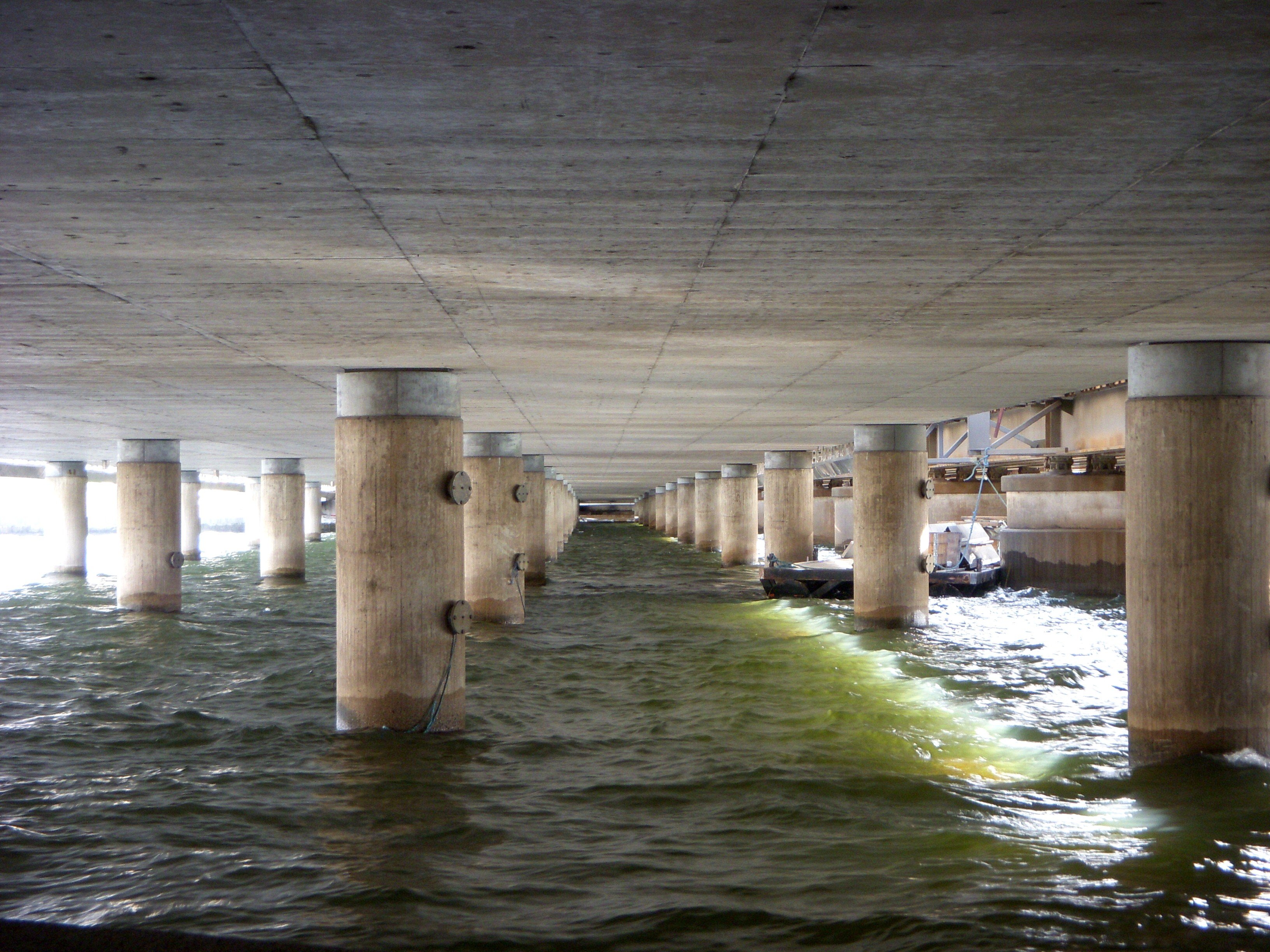 Norra Centralbron i Stockholm